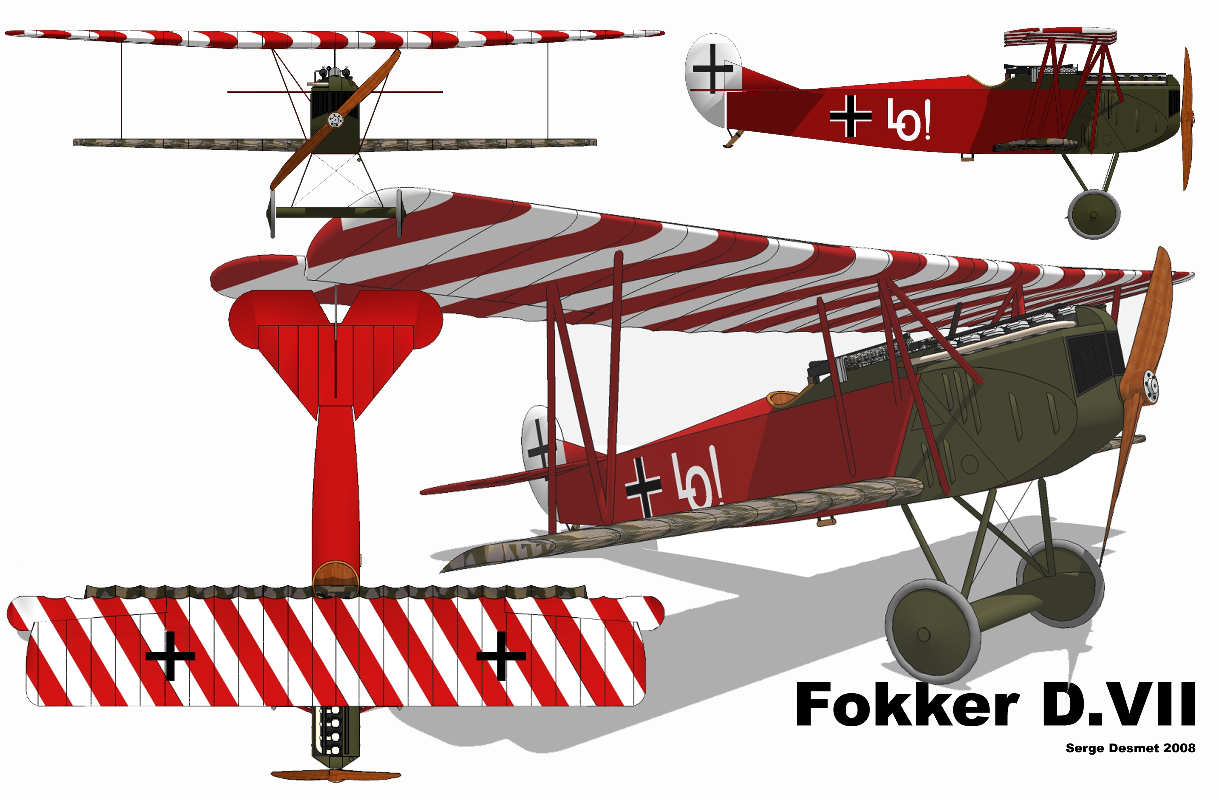 Plan 3 vues du Fokker D.VII